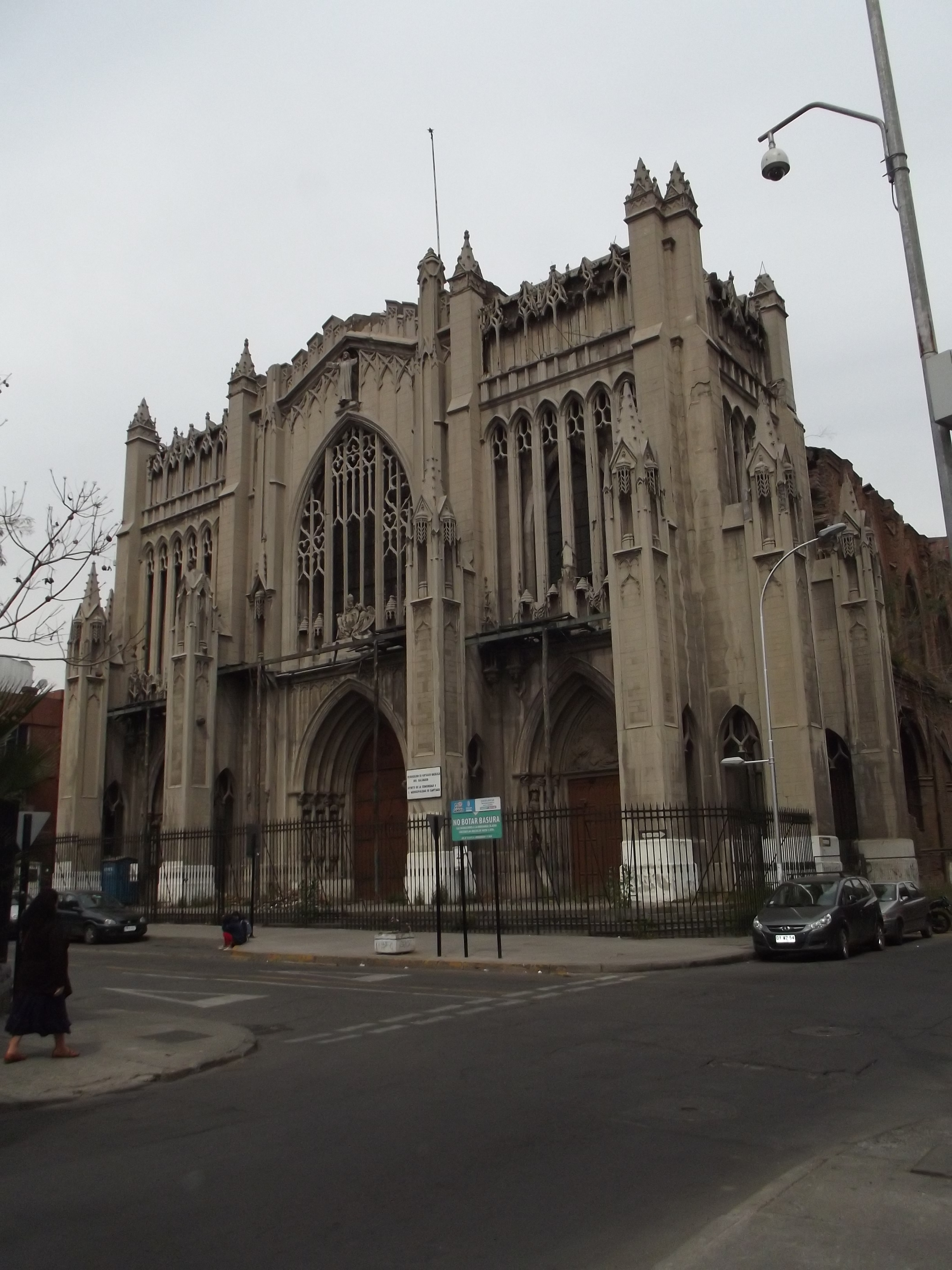 Basílica El Salvador, desde esquina noroeste, Huérfanos con Almirante Barroso. This is a photo of a national monument in Chile: 207